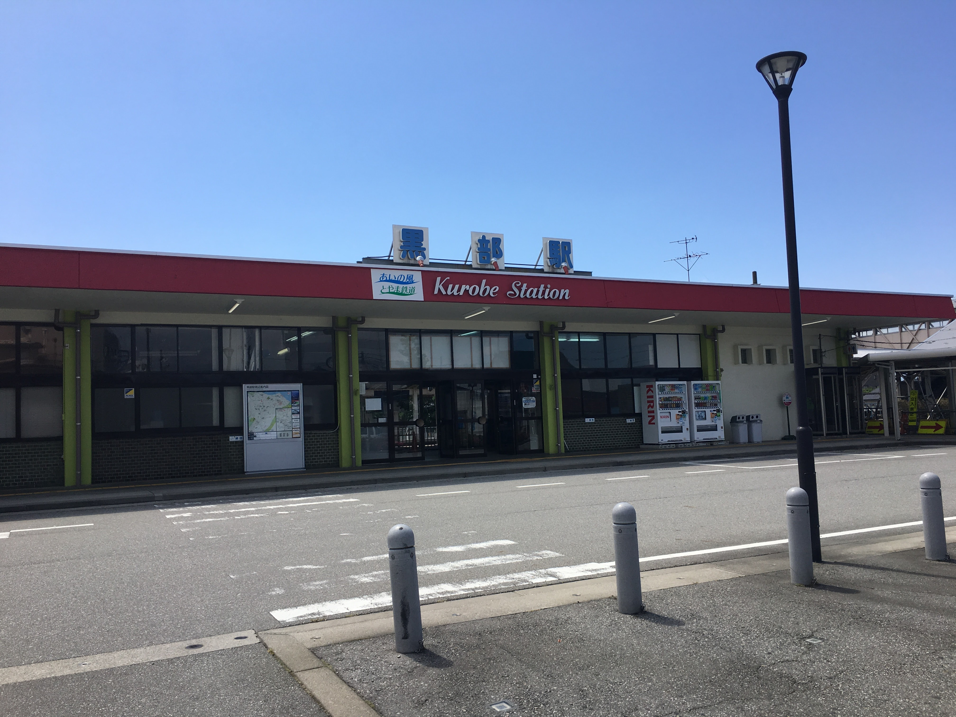 黒部駅駅舎